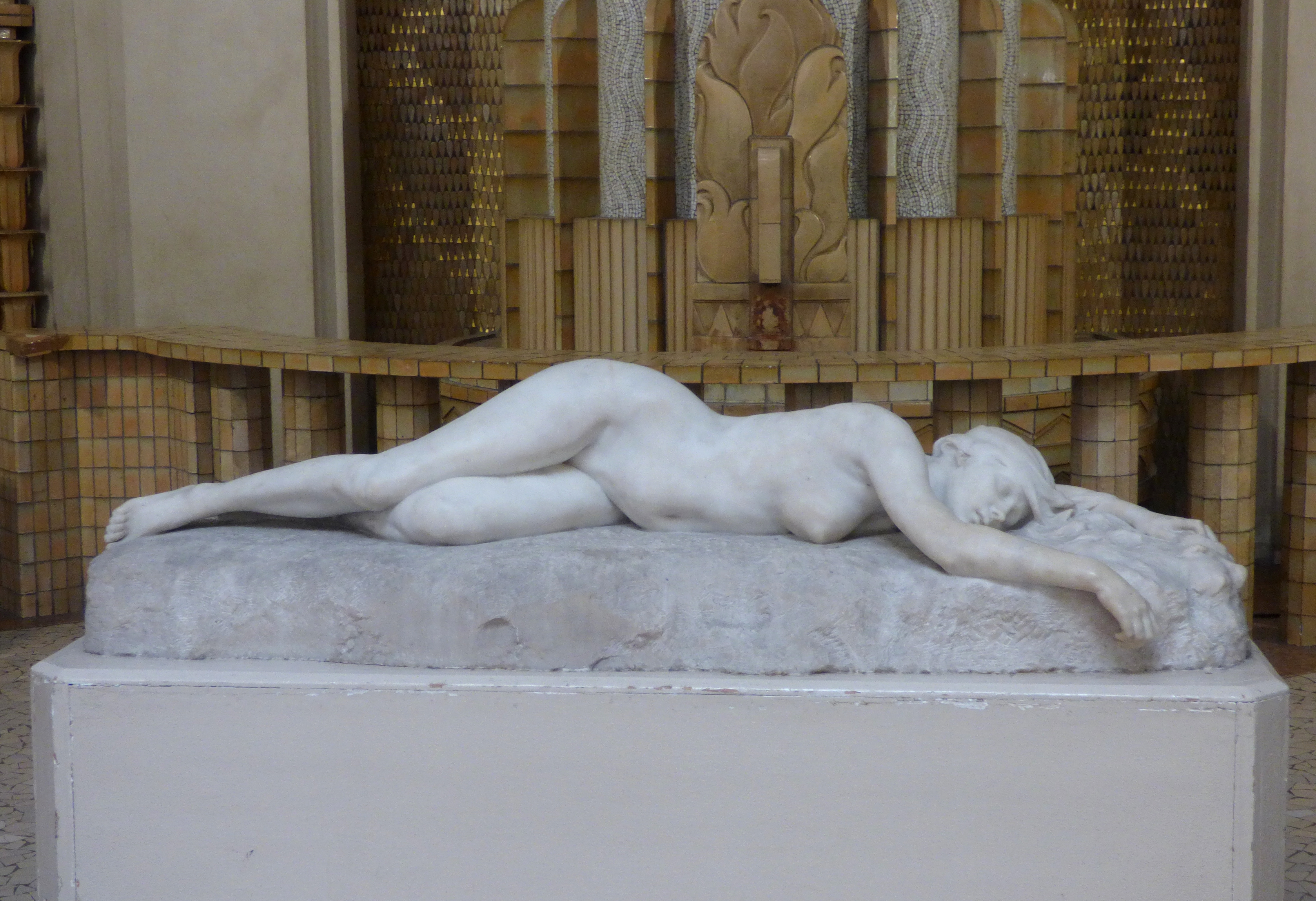 La fin d'un rêve (sculpture en marbre), Henri Frédéric Varenne.